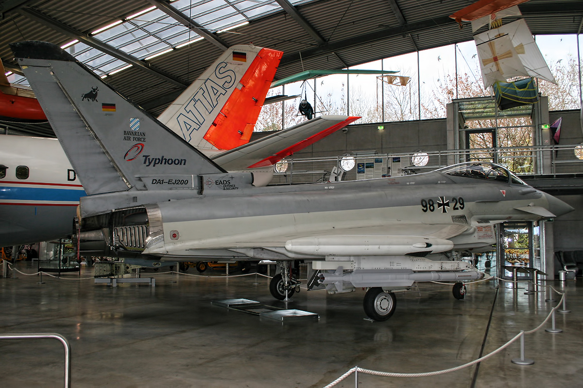 Oberschleißheim Aviation Museum